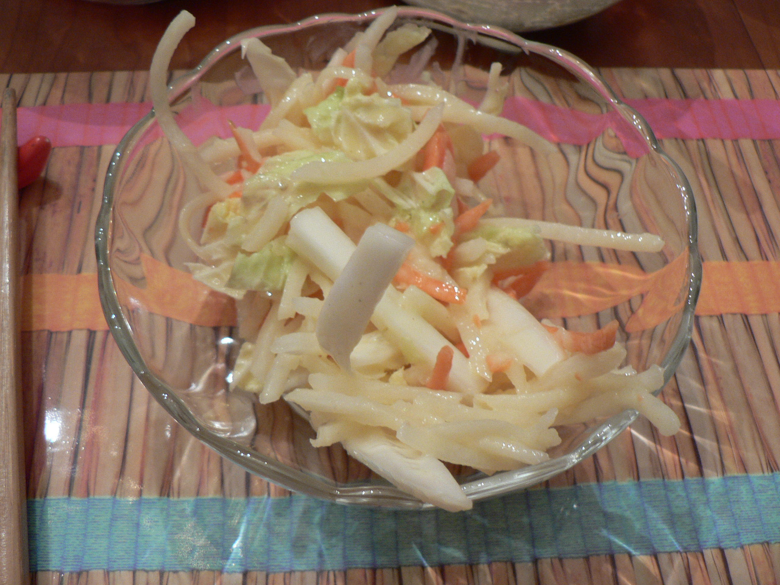 namasu with kimizu